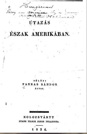 Bölöni Farkas Sándor: Utazás Észak-Amerikában. Az 1834-es első kiadás címlapja